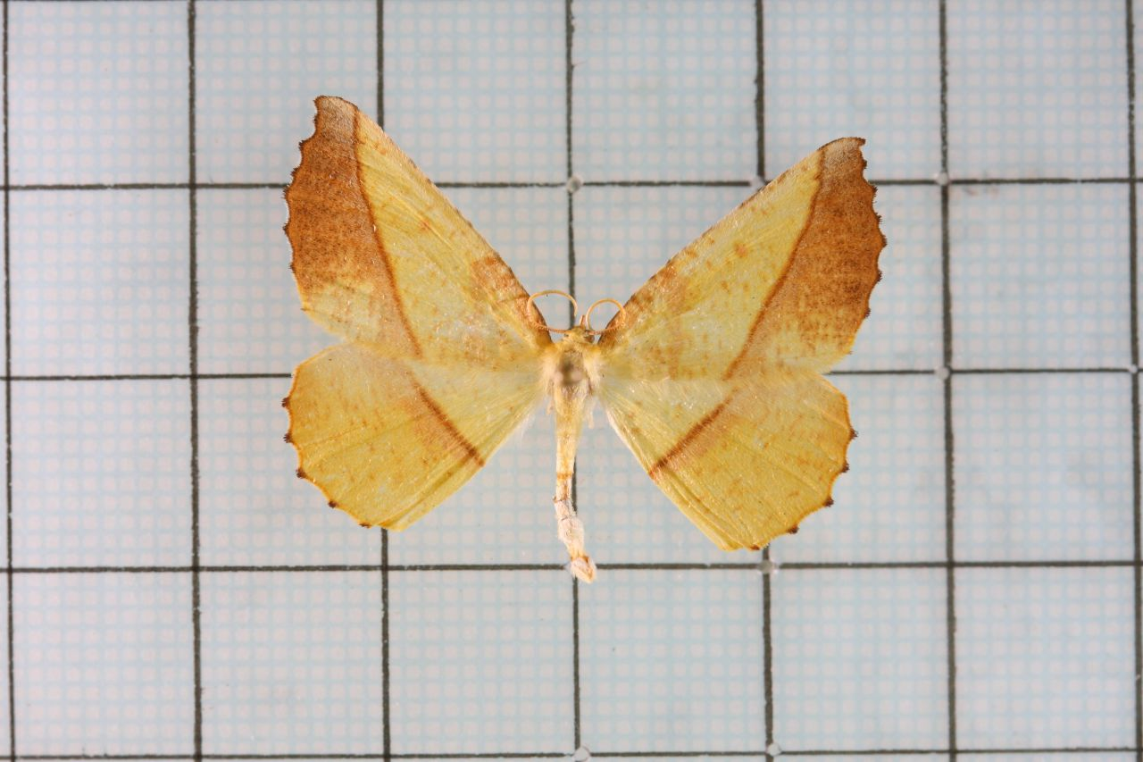 Auaxa cesadaria Walker 鋸褐緣黃尺蛾 鞍1: P37, Pl:8-20